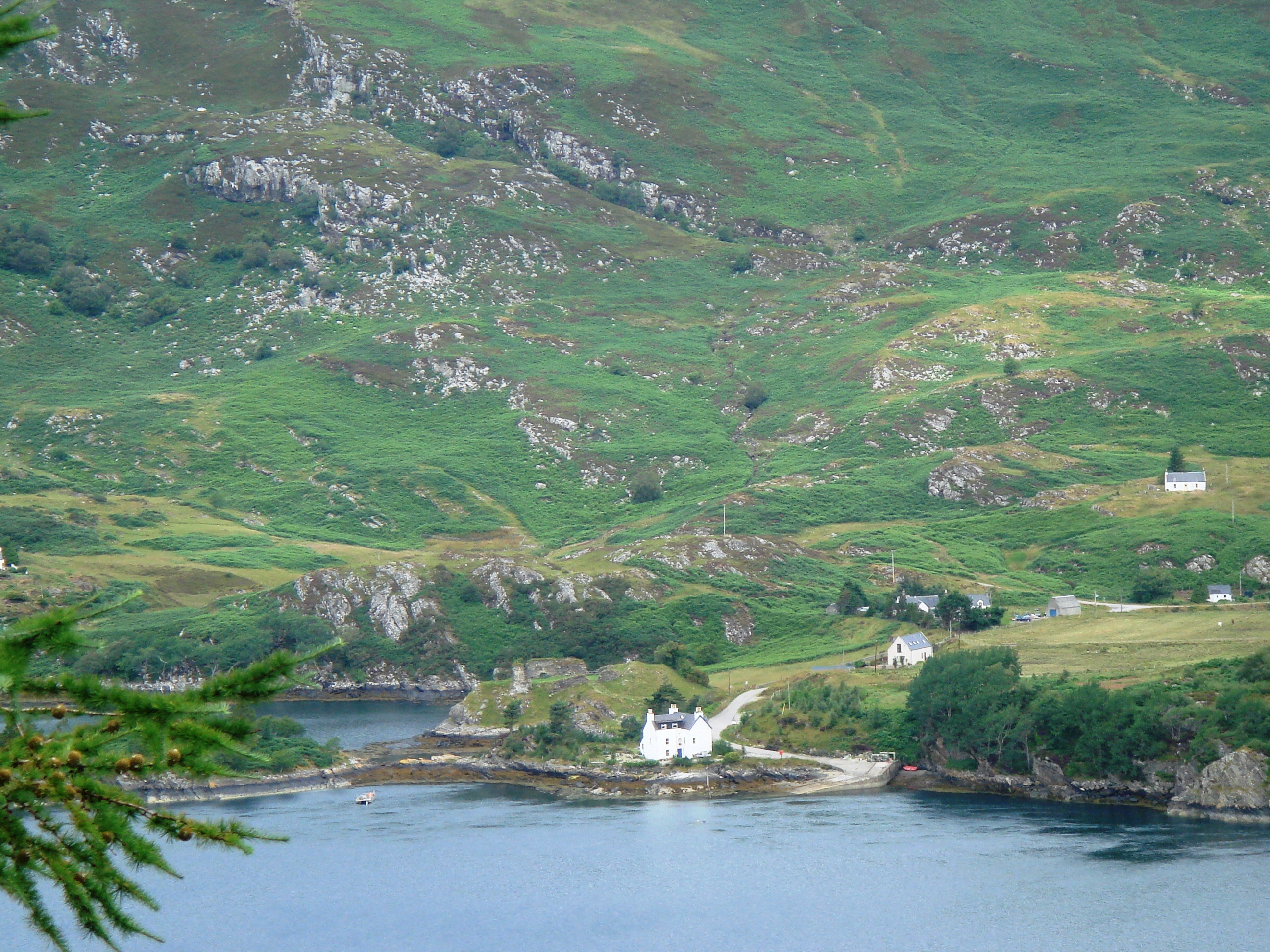 Loch Carron (Escocia)